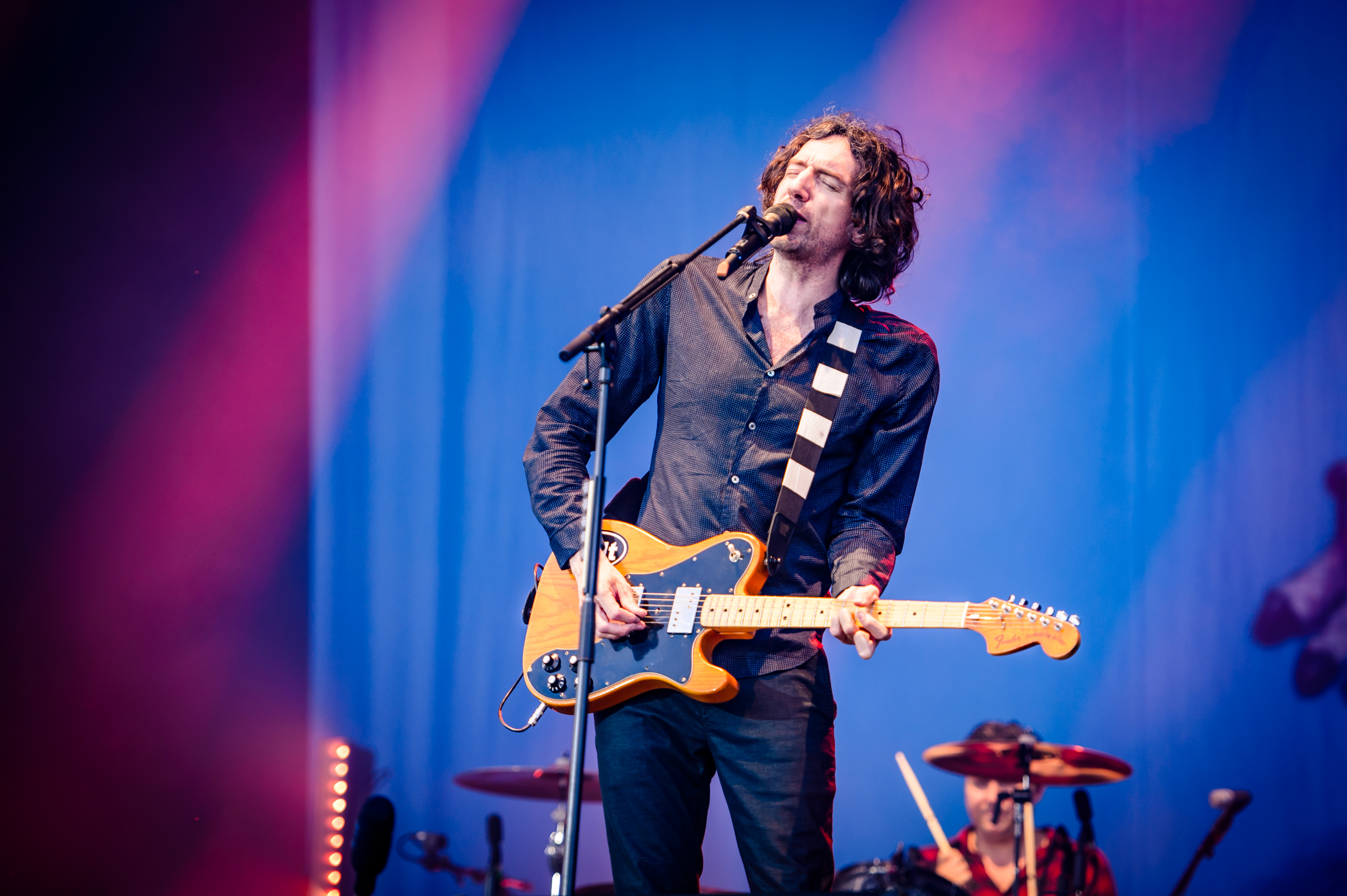 'Rock im Park 2018; Zeppelinfeld Nürnberg': 'Snow Patrol'